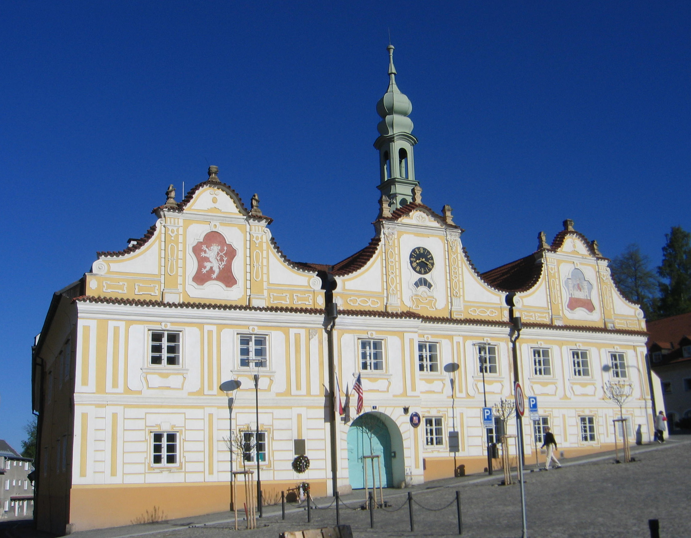 Radnice (Kašperské Hory), Náměstí, Sušická 1, Kašperské Hory